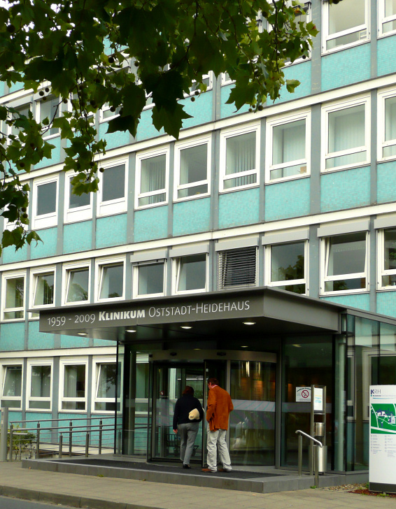 Eingang Oststadtkrankenhaus